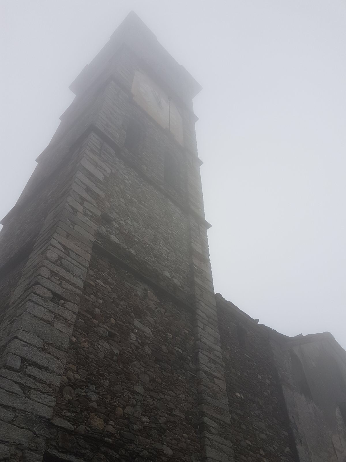 Il campanile della Chiesa dedicata ai Santi Eusebio e Vittore di Peglio in una giornata nebbiosa.